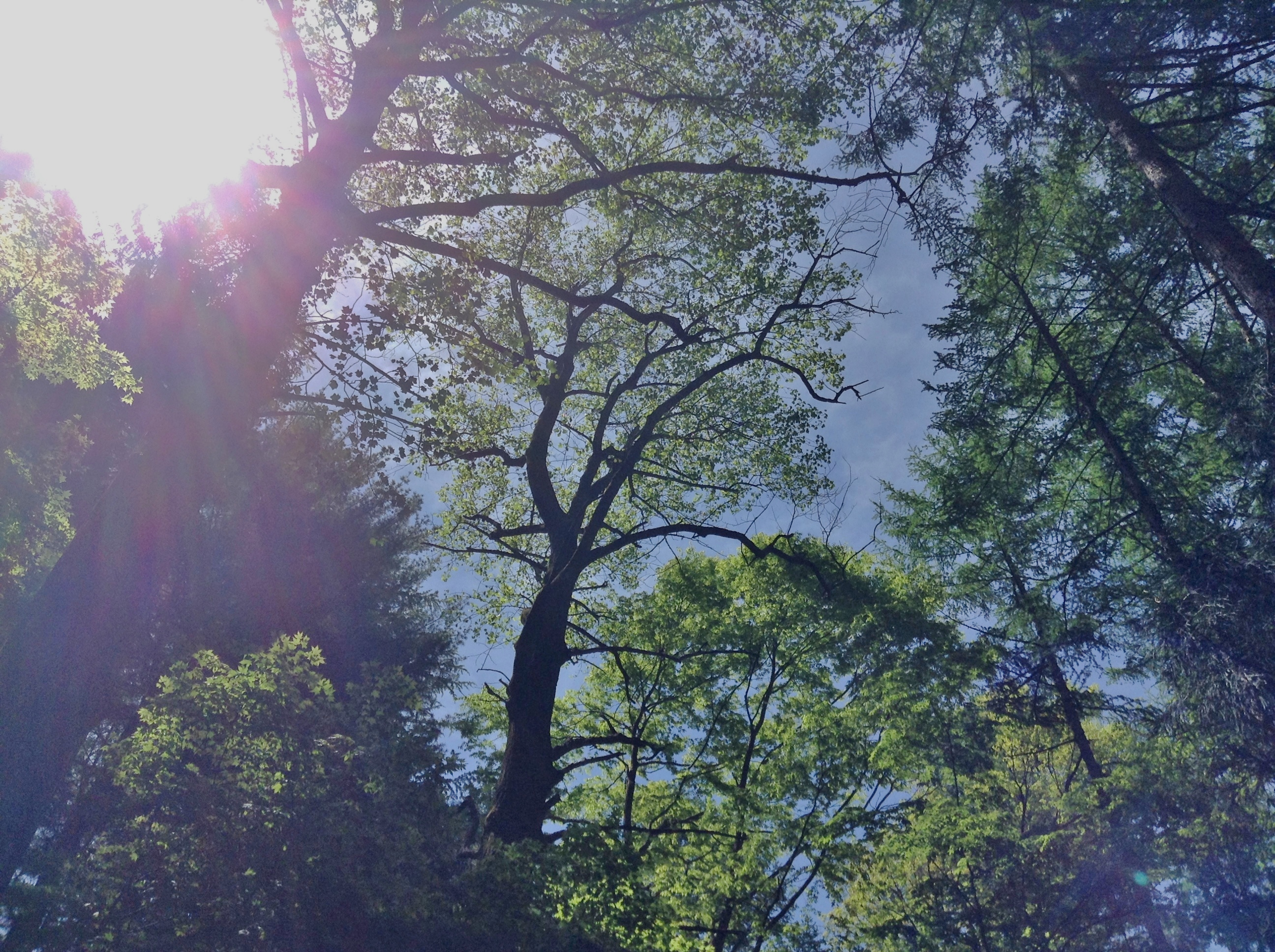 長野県伊那市高遠の、進徳の森に植えられた、ユリノキ２本です。